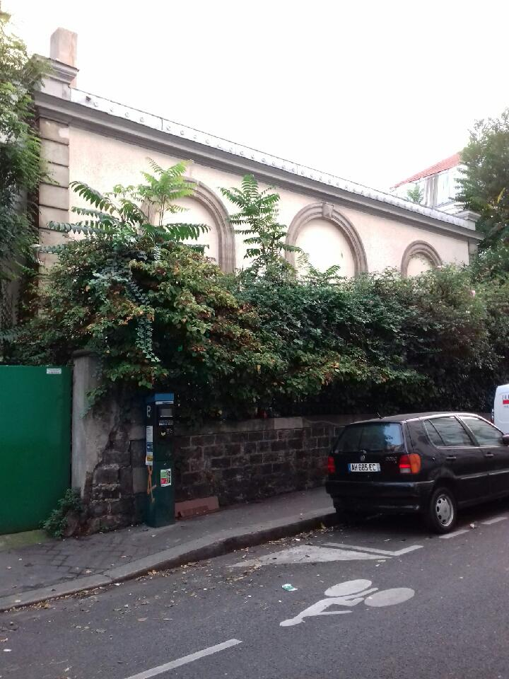 Petite Ceinture ferroviaire (Paris 20e). Gare de la rue d'Avron sise 4 rue Ferdinand-Gambon. Jeudi 18 octobre 2017.